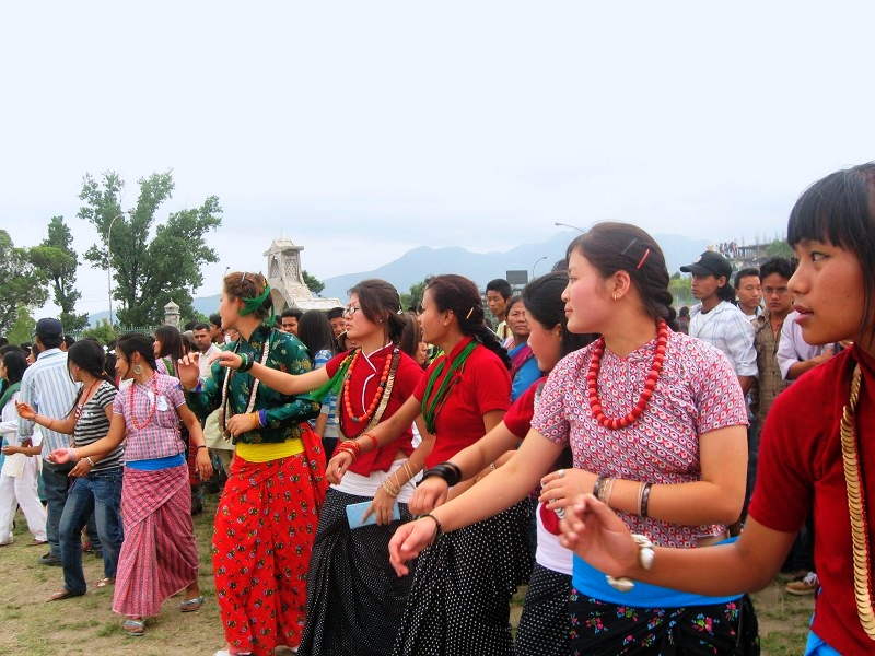 2008 Sakela Ubhauli at Tundikhel, Kathmandu,Nepal